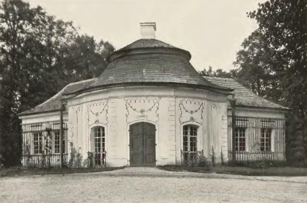 Das Weinbergschlösschen in Bad Carlsruhe in Oberschlesien